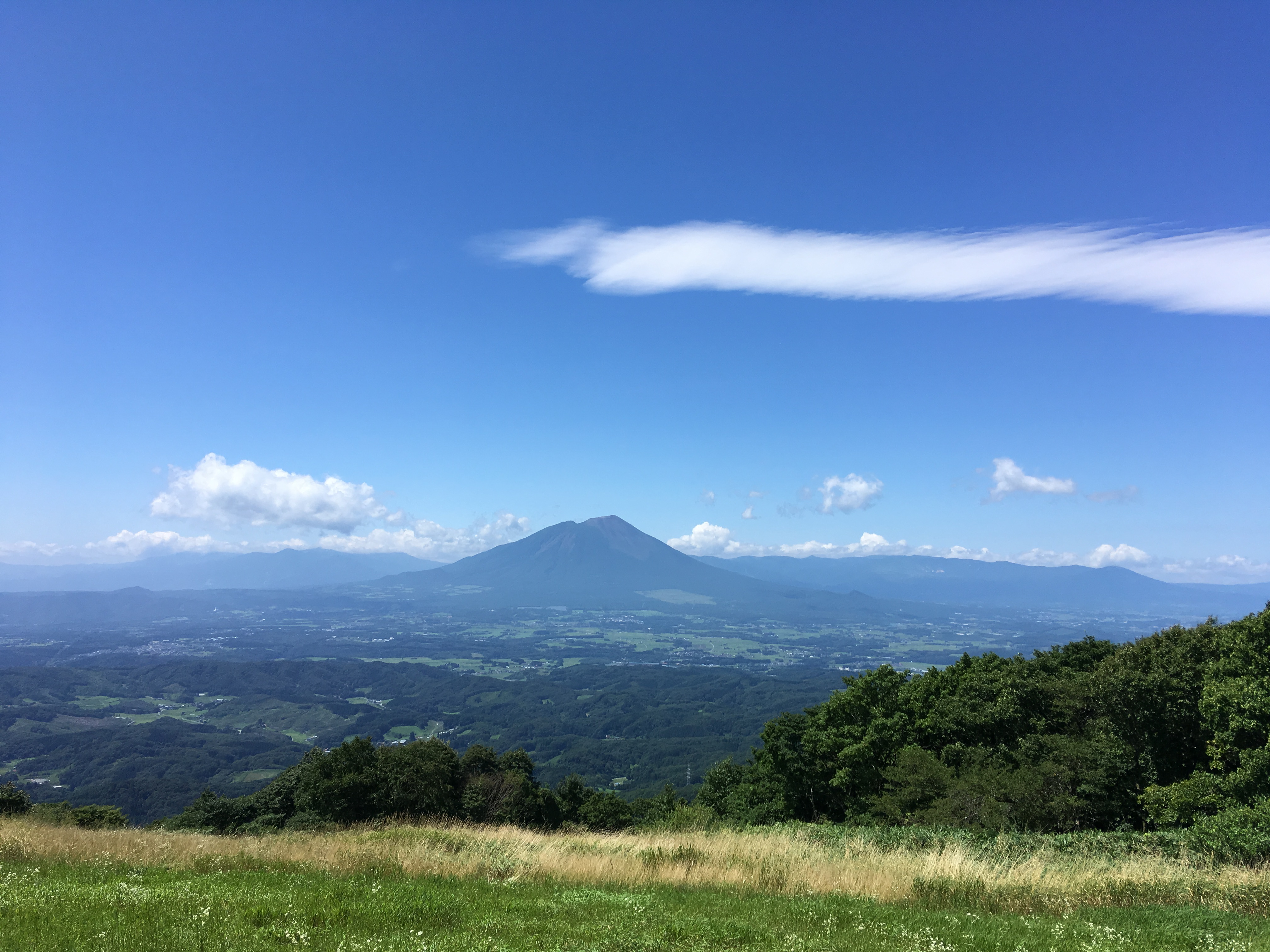 地元の人からは天峰山と呼ばれている展望ポイント。